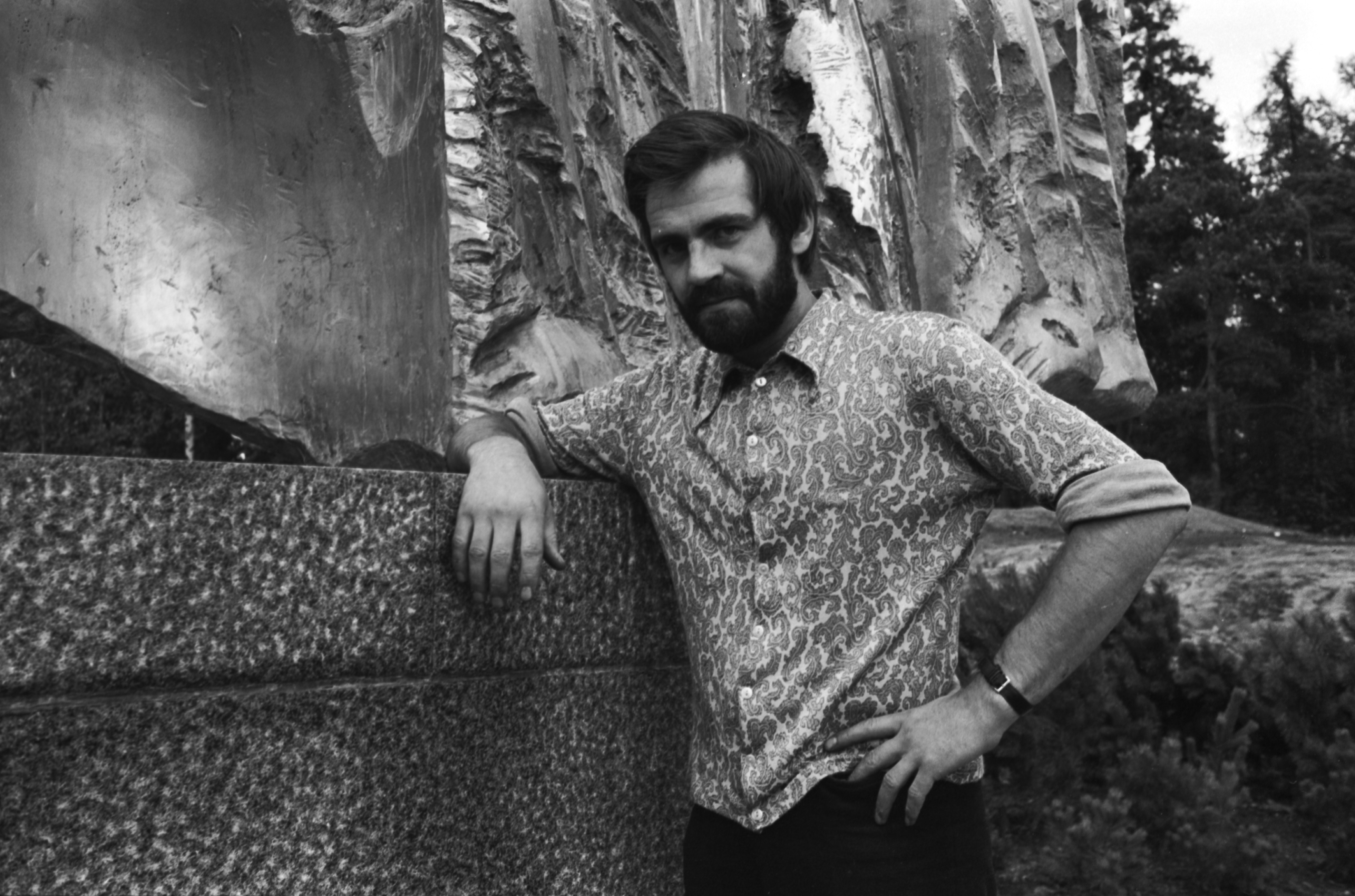 Kuvanveistäjä Taisto Martiskainen (1943–1982) veistoksensa Crescendo äärellä.